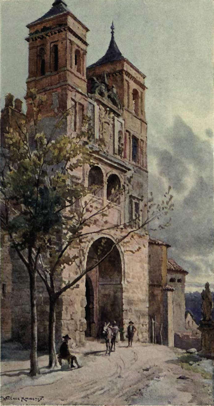 Grabado de la puerta del Cambrón de Toledo